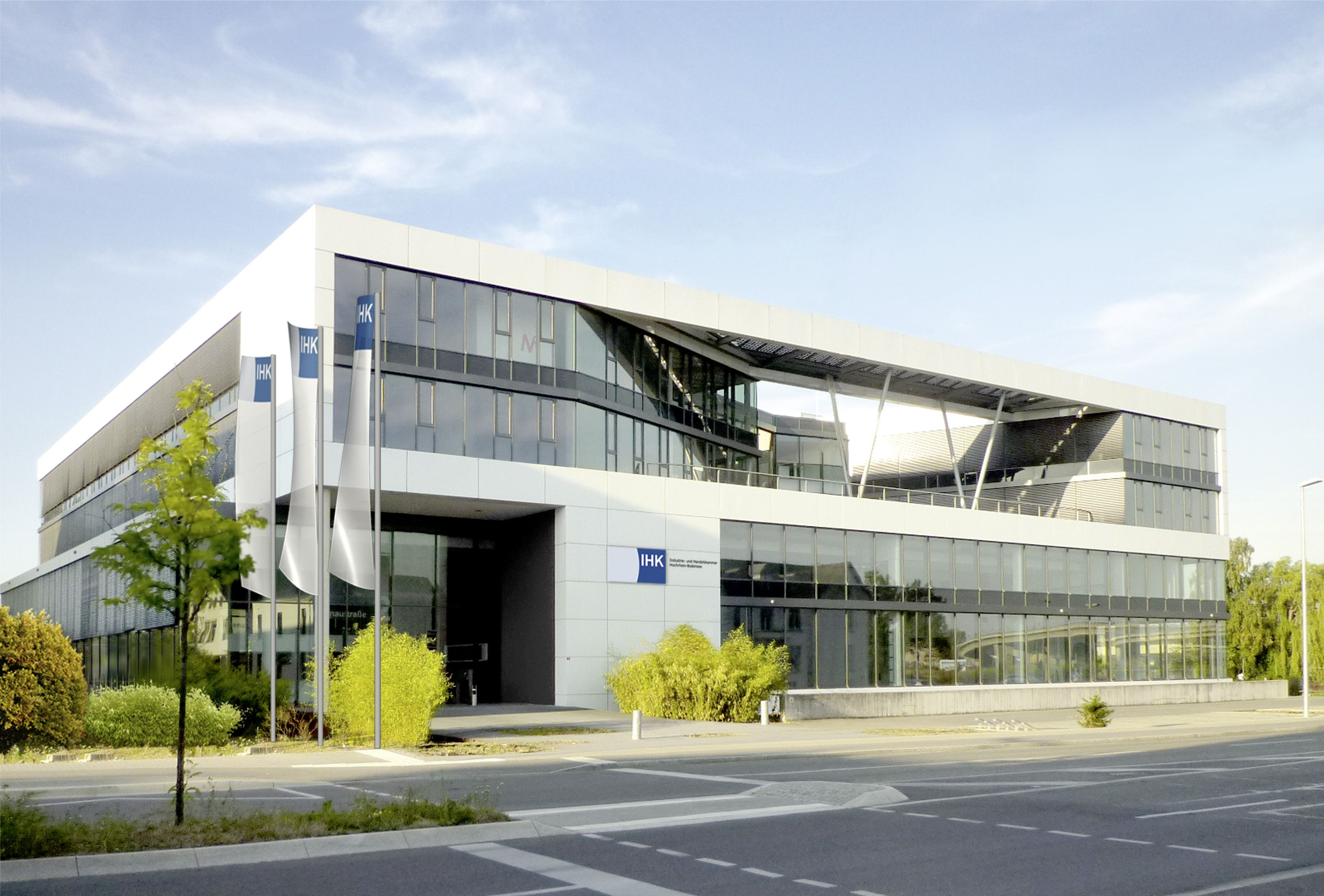 Neue Anschrift ab Montag, den 15. August 2016